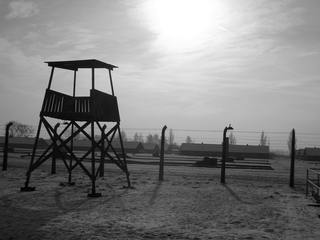 Zdjęcie zrobione podczas 69. rocznicy wyzwolenia KL Auschwitz-Birkenau.